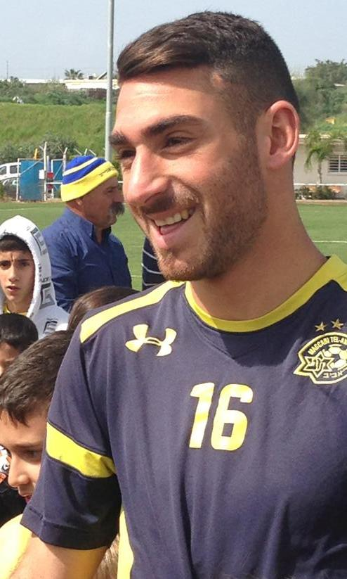 אלירן עטר עם אהדי מכבי תל אביב